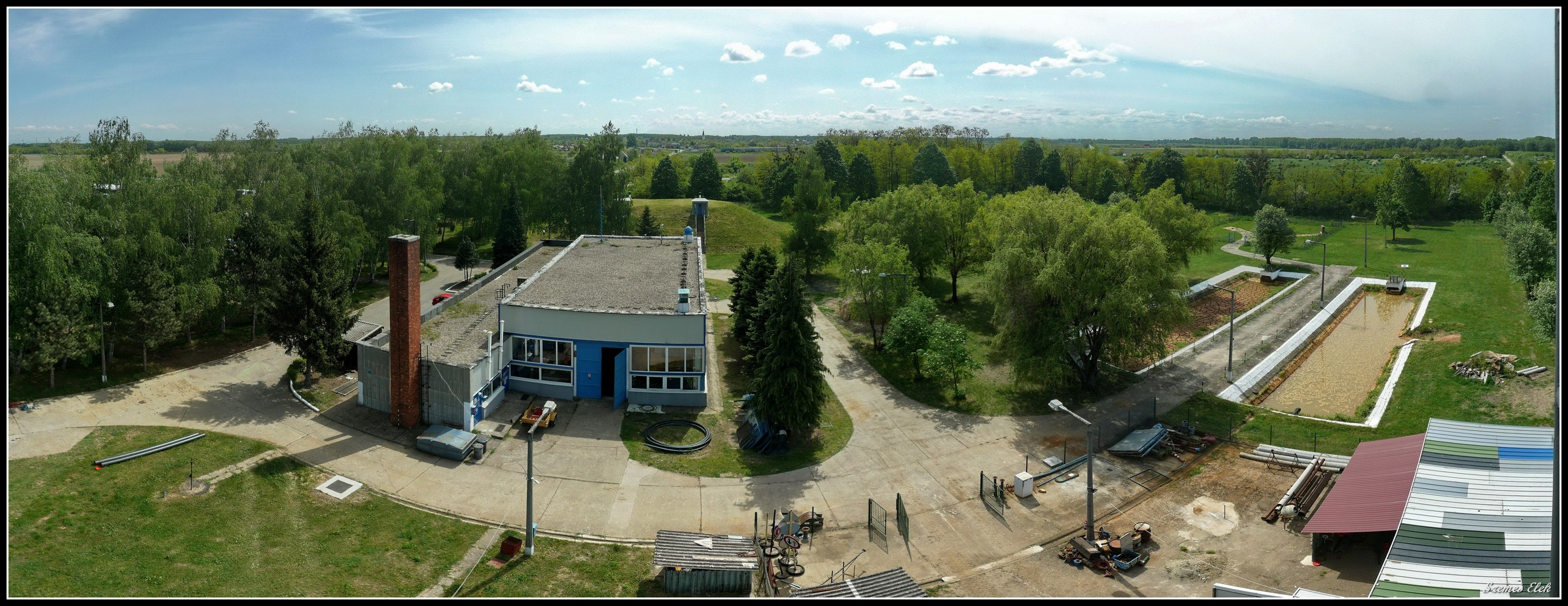 Tiszabezdéd, 4624 Hungary